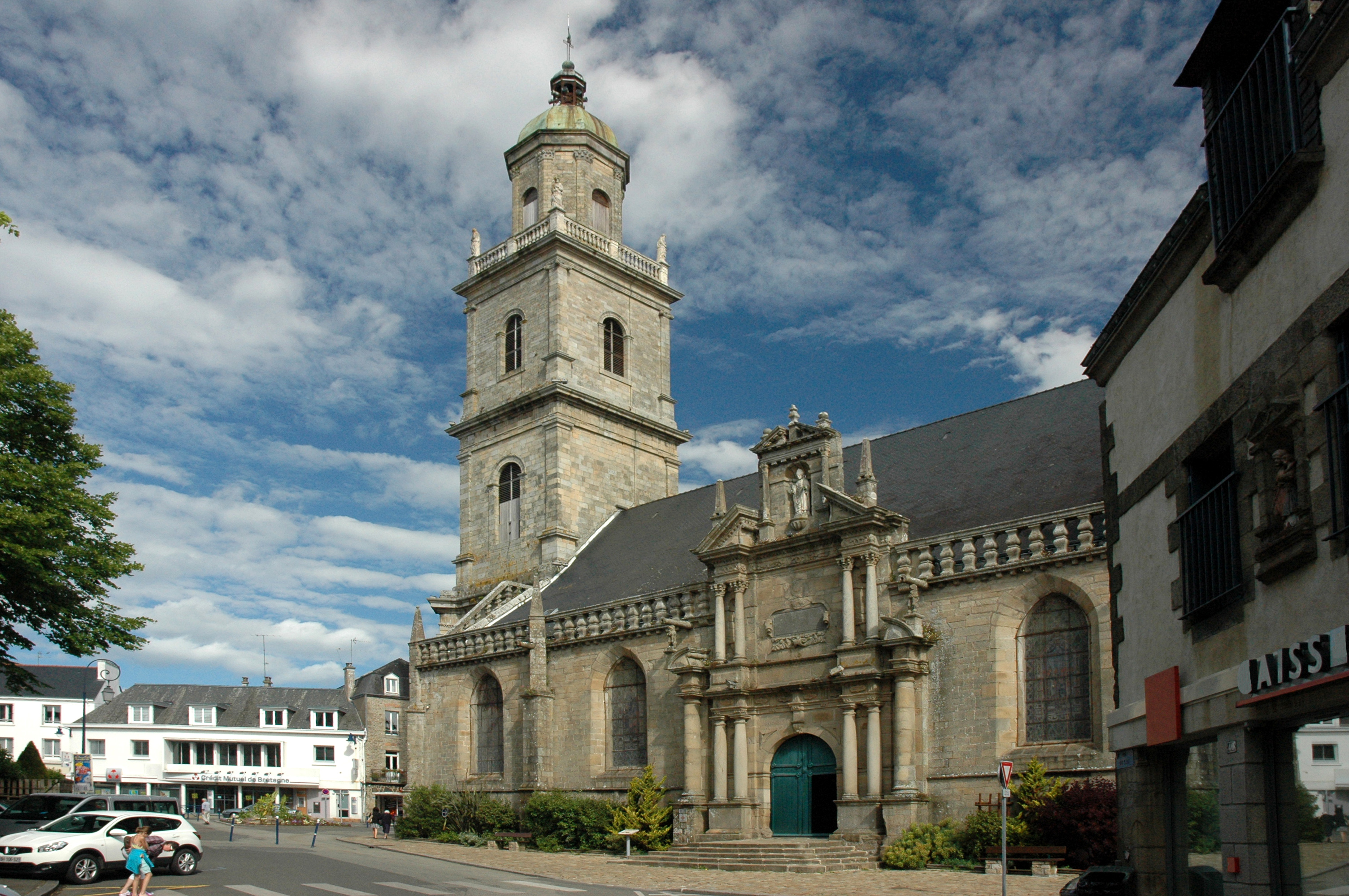 France, Église Saint-Gildas d'Auray